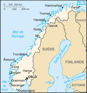 carte norvège - origine CIA World Factbook fichier GIMP disponible : Image:No-map.xcf